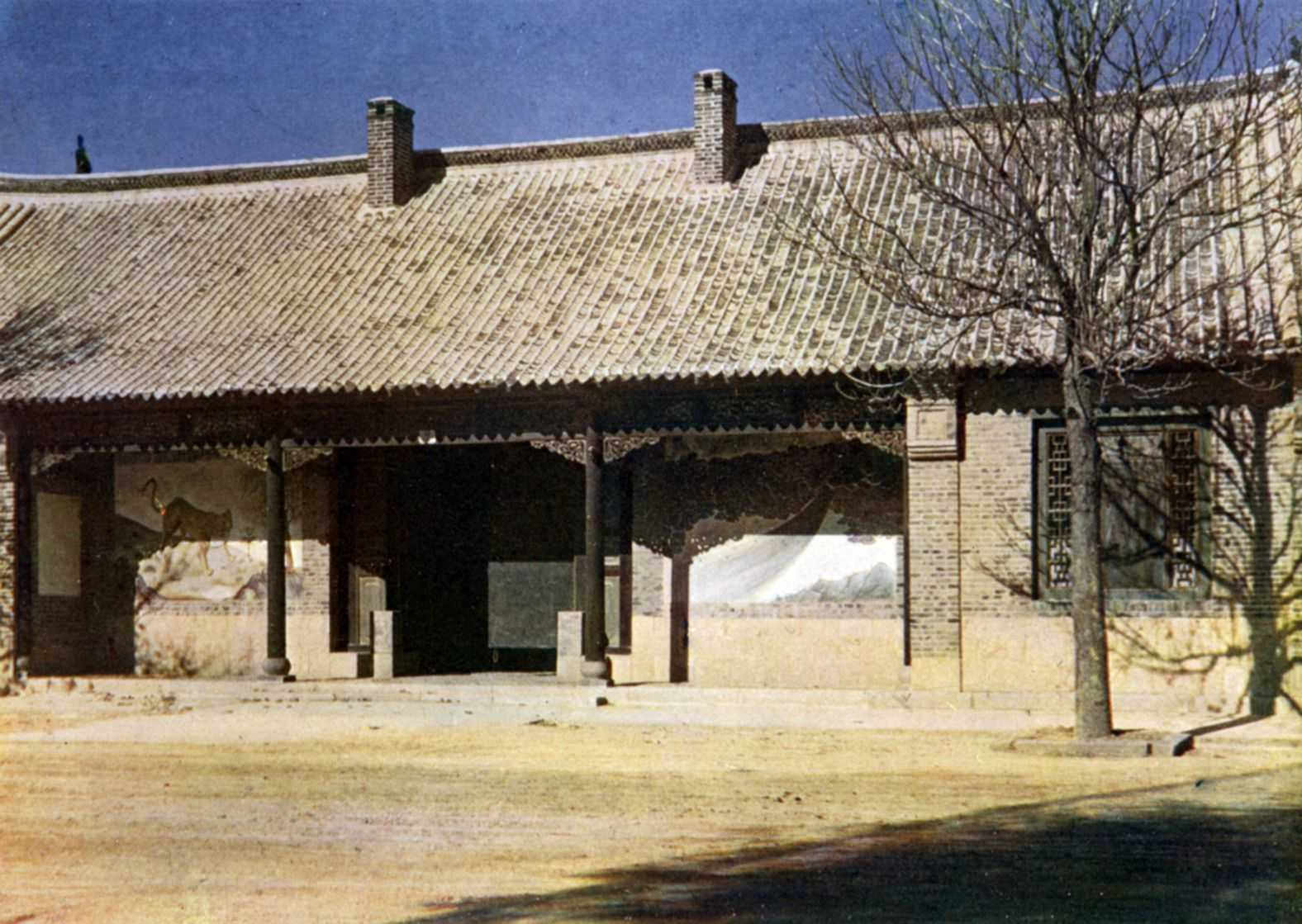 青岛老衙门大门